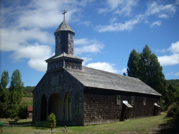 Iglesia de Quetalco